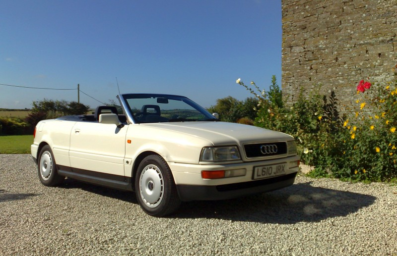 Audi Cabriolet (B3/B4) 1994